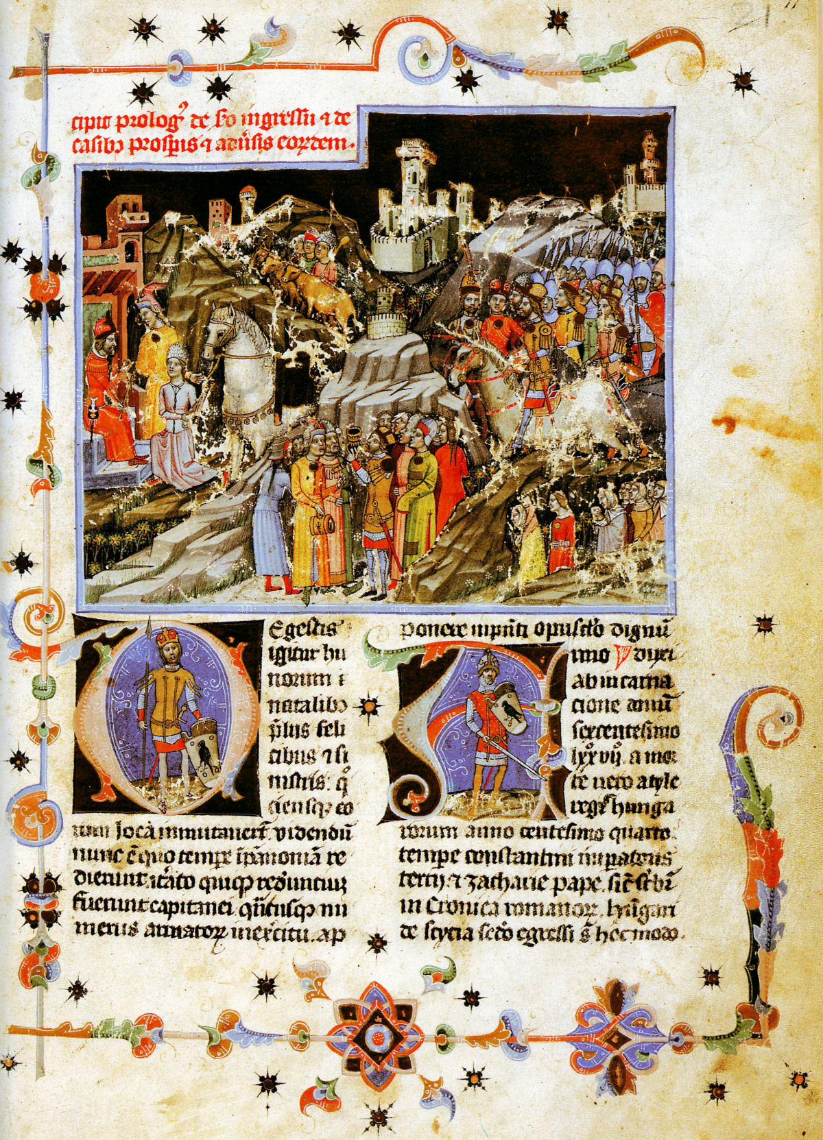 A Képes Krónika 21. lapja. A felső nagy miniatúra a magyarok bejövetelét Pannóniába. A kép bal oldalán Kusid köszönti Szvatoplukot és népe nevében átadja ajándékát: Árpád ménesének leggyönyörűbb fehér lovát. A "D" iniciálé bizonytalan, hogy Elődöt, vagy Árpádot, az "A" iniciálé szintén bizonytalan, hogy Álmost, vagy Árpádot ábrázolja